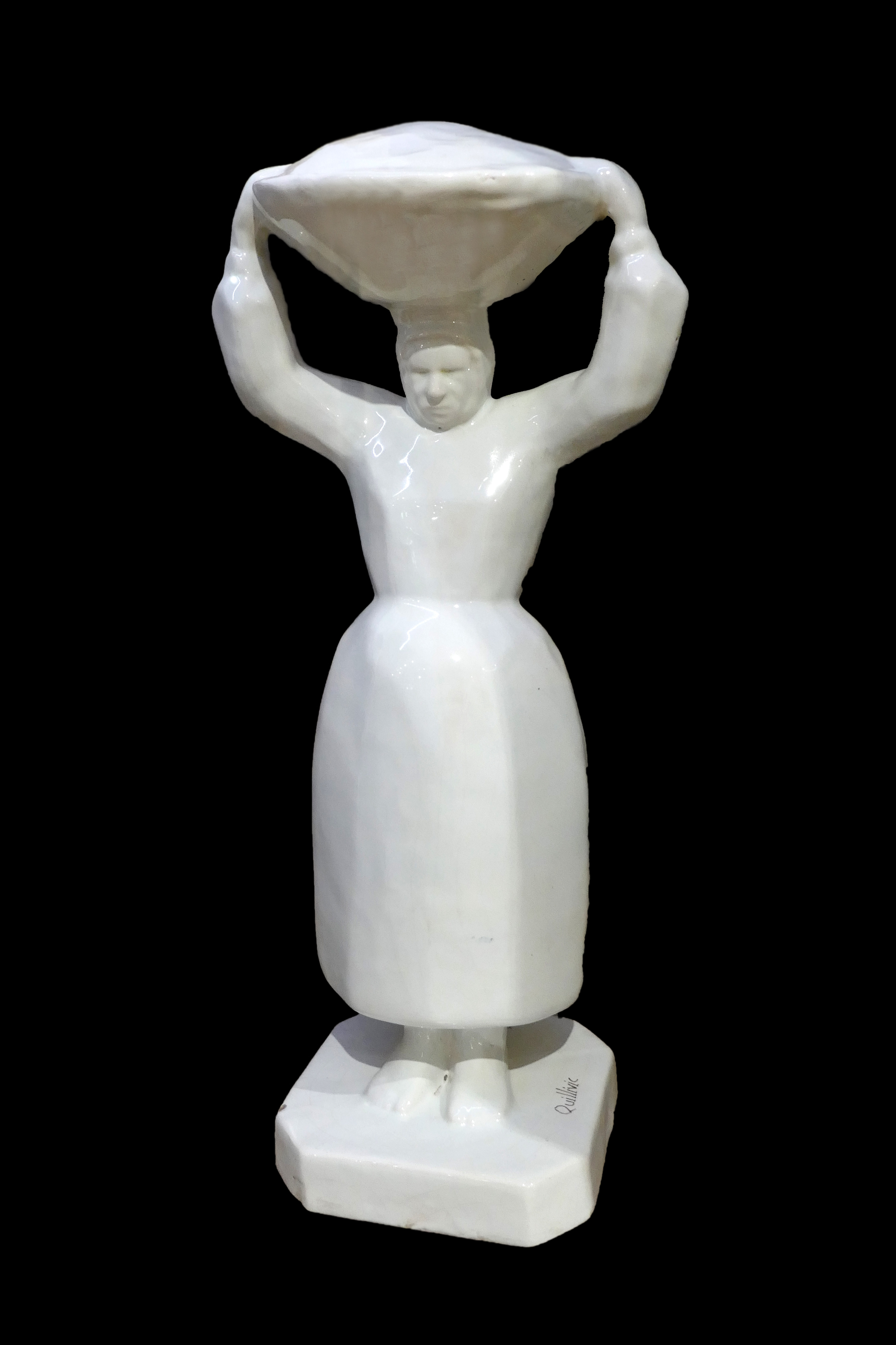 Jorj (Georges) Robin, La Porteresse, 1926. Faïence stannifère de Quimper. Verlingue-Bolloré, Musée des marais salants à Batz-sur-Mer (Loire-Atlantique).